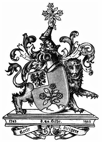 Herb Rudolfa Ludwiga von Decker. Tytuł dziedzicznej szlachty otrzymał w 1863 z okazji 100-lecia drukarni założonej przez Georga Jacoba Deckera w 1763.